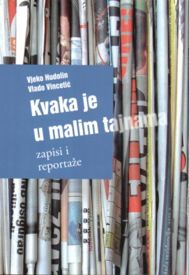 Vjekoslav Hudolin: "Kvaka je u malim tajnama : zapisi i reportaže", ISBN 978-953-95012-2-6